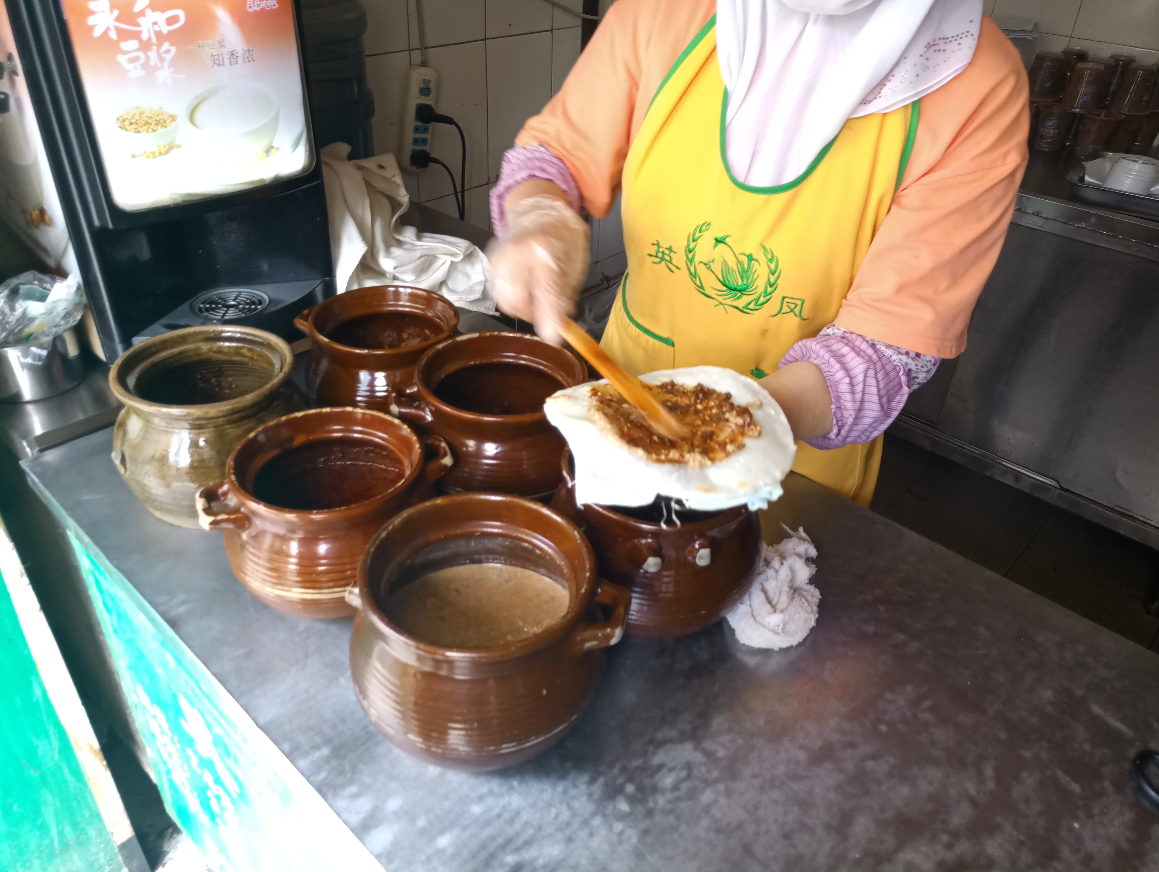 中文（中国大陆）: 昆明英凤烧饵块